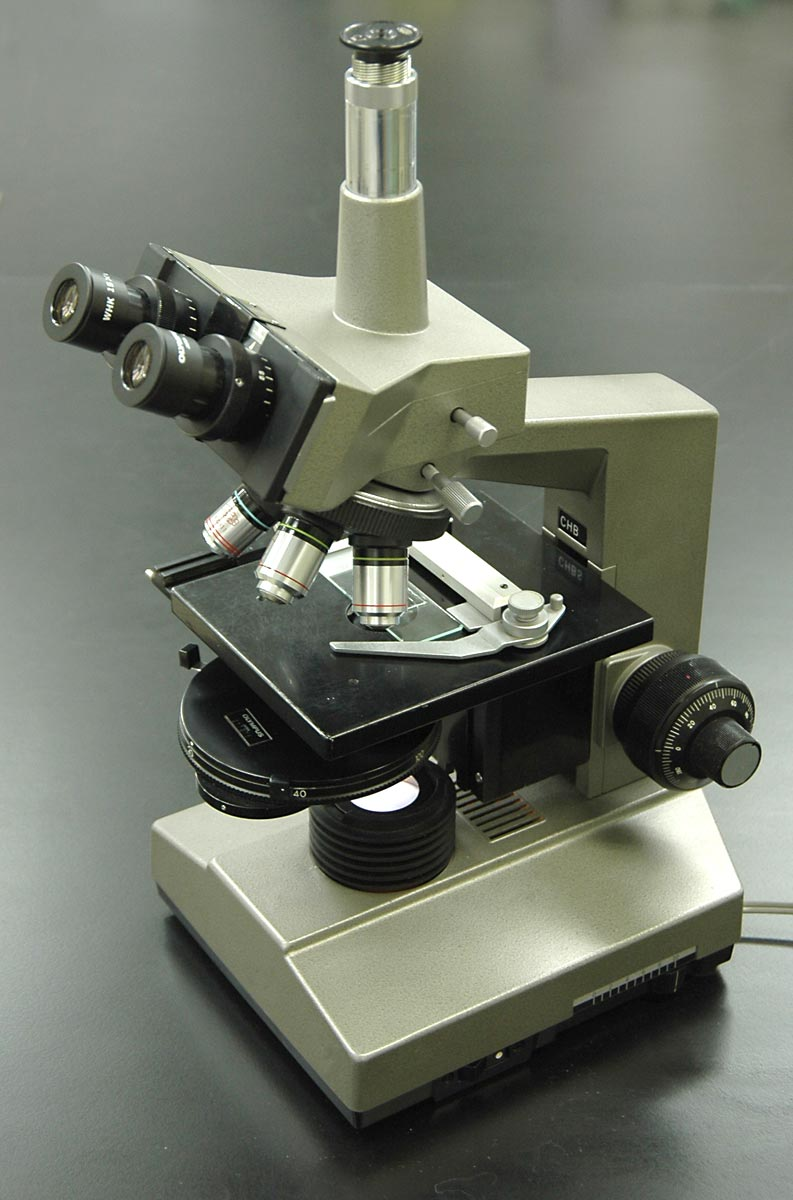 phase contrast microscope